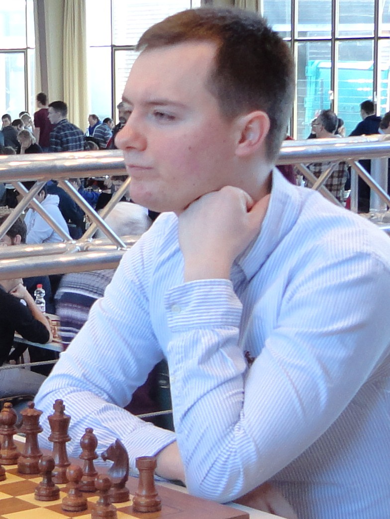 Falko Bindrich, Grenke Chess Open 2016 in Karlsruhe.